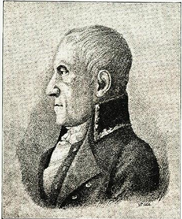 Den norske embetsmannen Enevold Falsen.